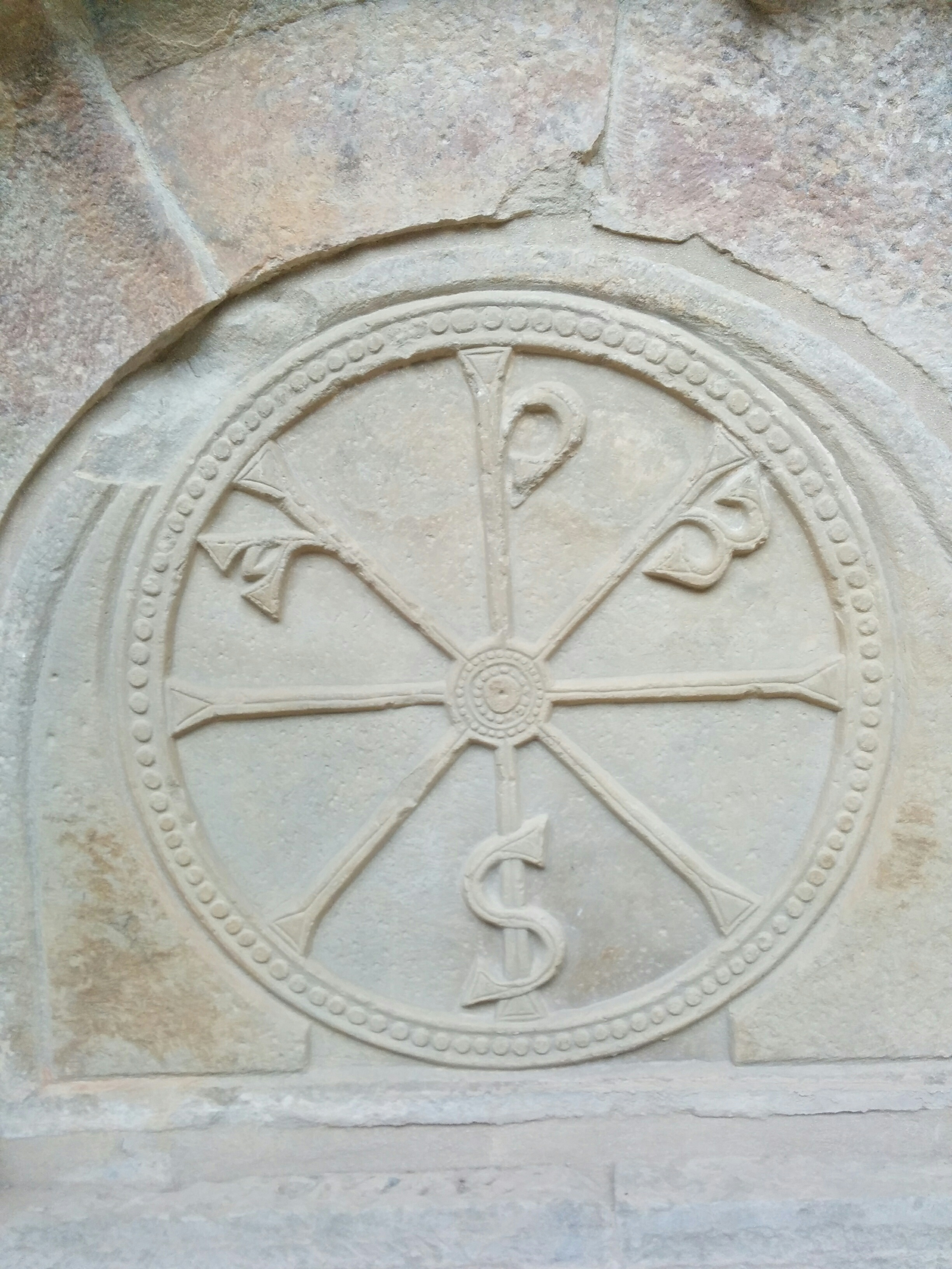 san juan de la peña